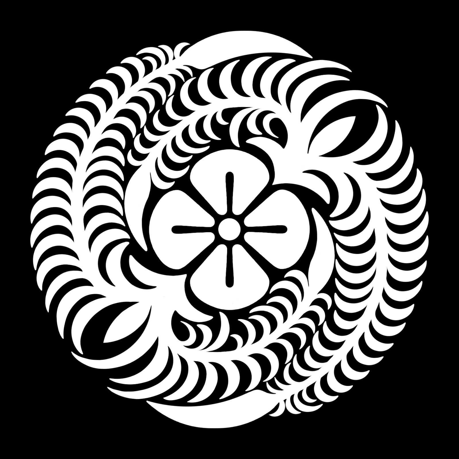 「花かつみ（花勝見）」紋（染抜）